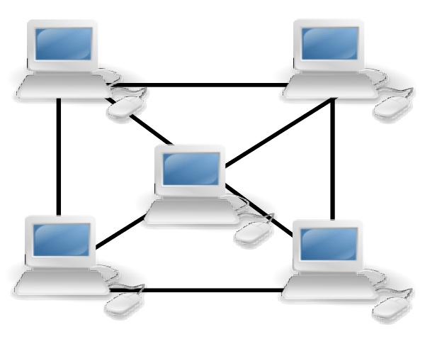 Debuxo realizado a partir de e